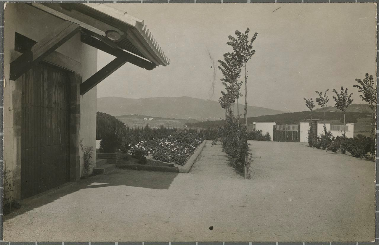 Portes d'entrada de la parcel·la del xalet Senya Blanca (S'Agaró) i porta del garatge